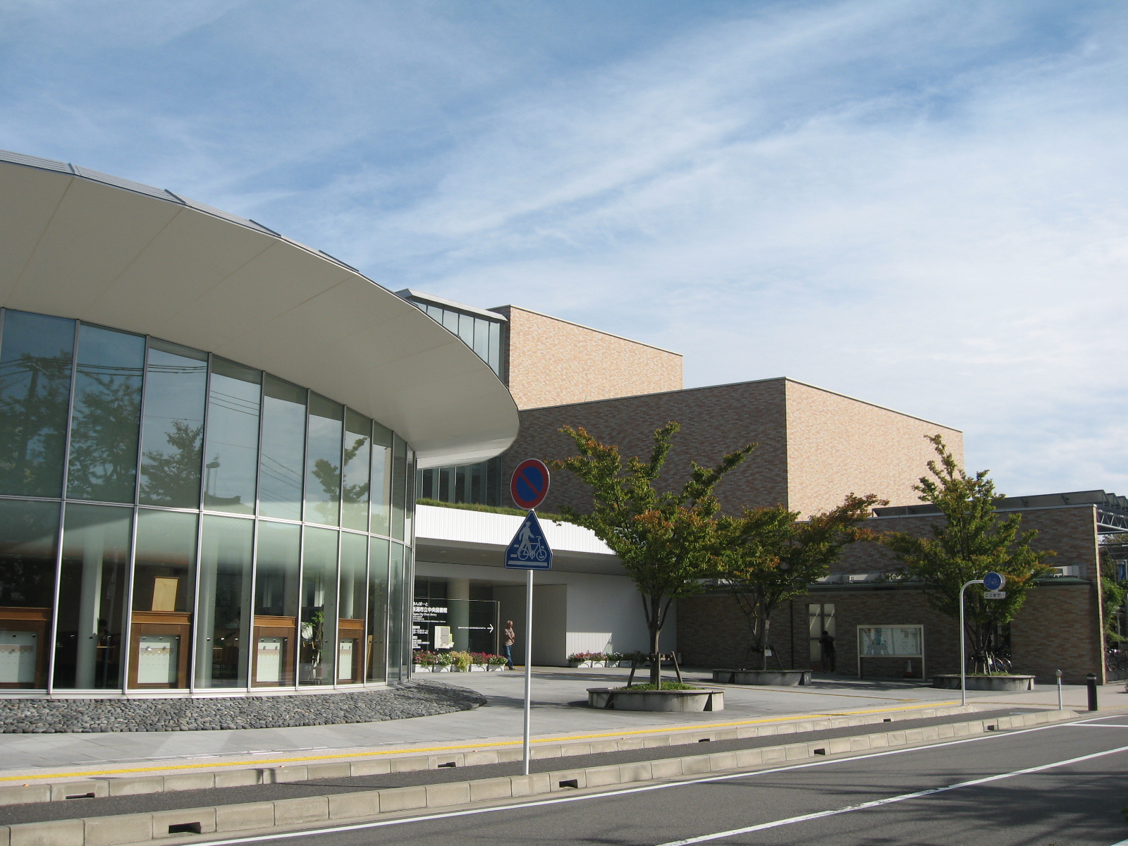 新潟市中央図書館